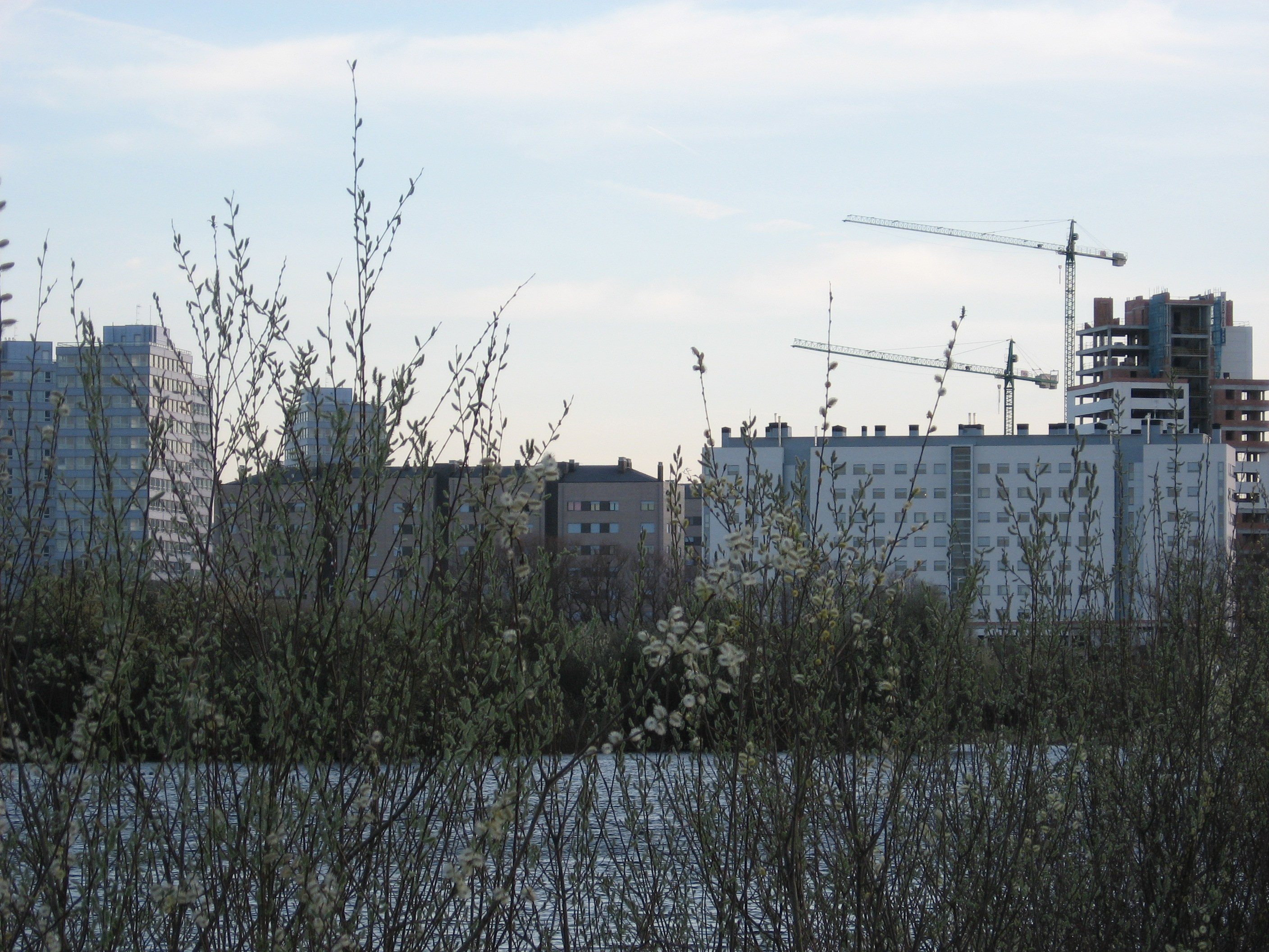 Desc: Imagen del barrio de Salburua desde las balsas. Author: Yrithinnd